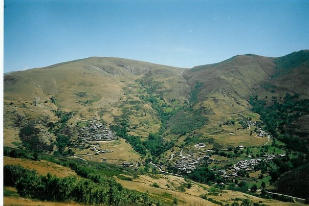 Vista panoramica del Pueblo de Silván